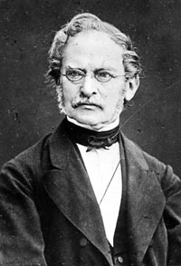 Peter Wilhelm Forchhammer (zeitgenössisches Foto vor 1894)